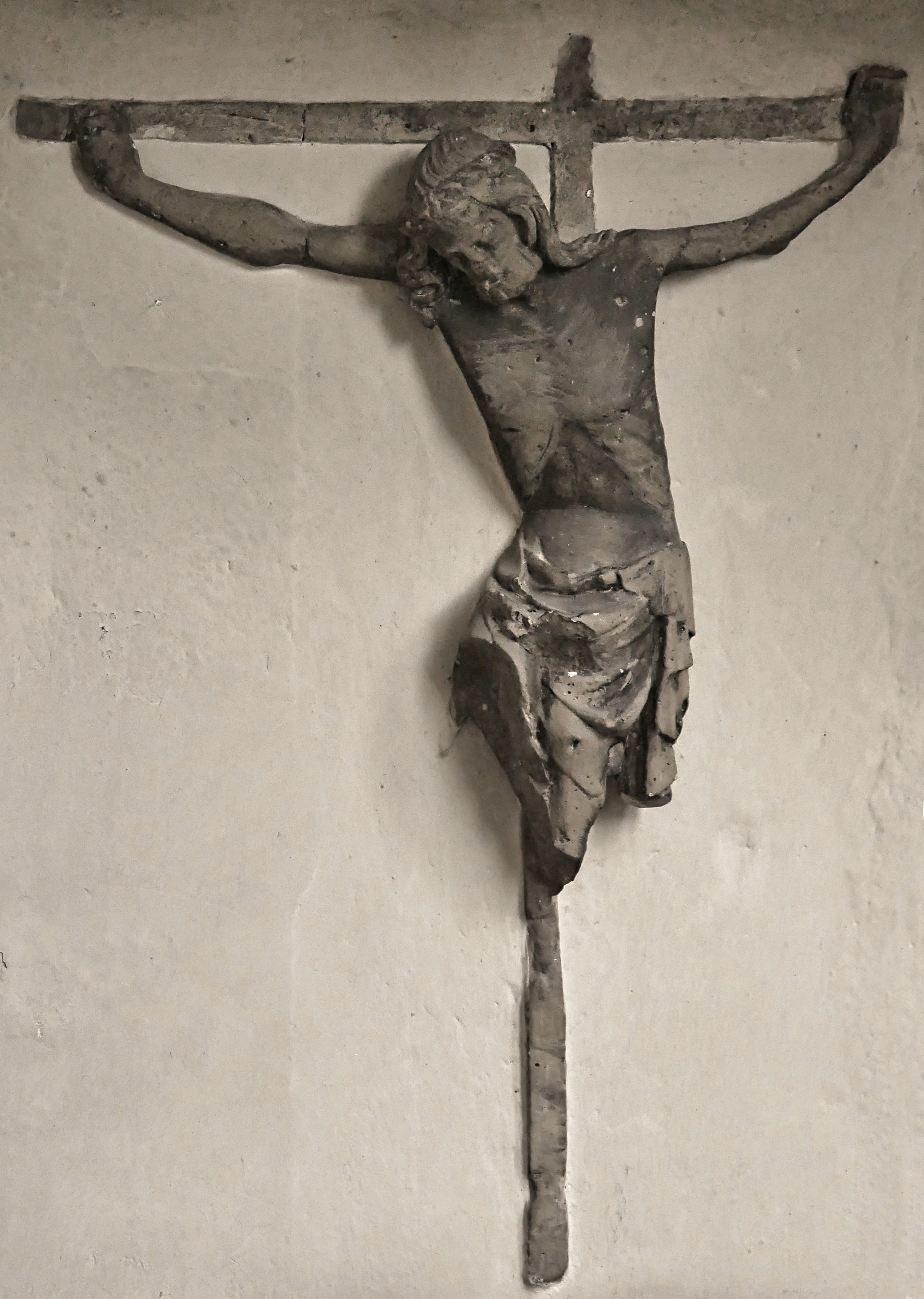 Fragment einer gotischen Kreuzigungsgruppe - Christuskirche Andernach